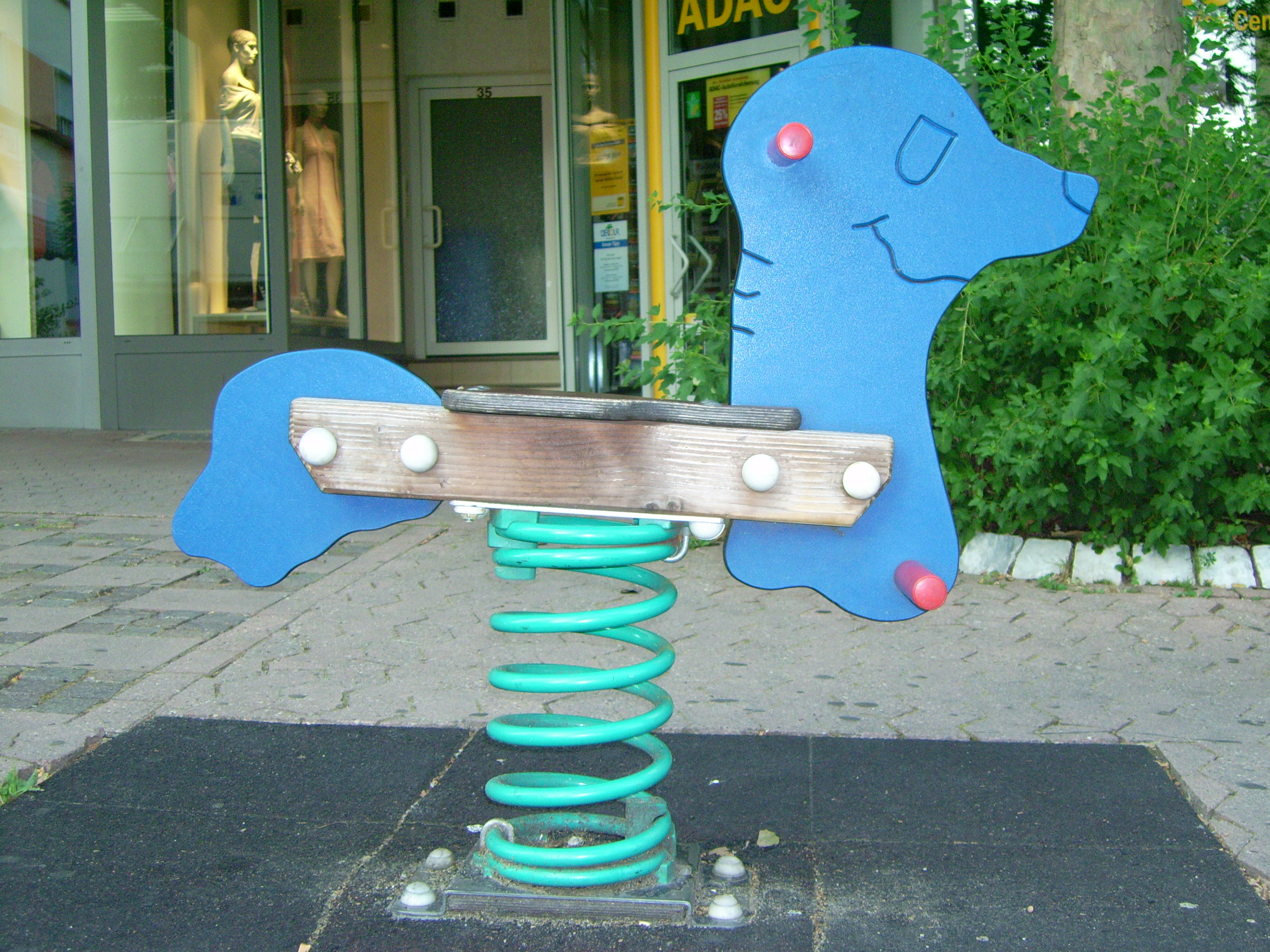 Bujak sprezynowy